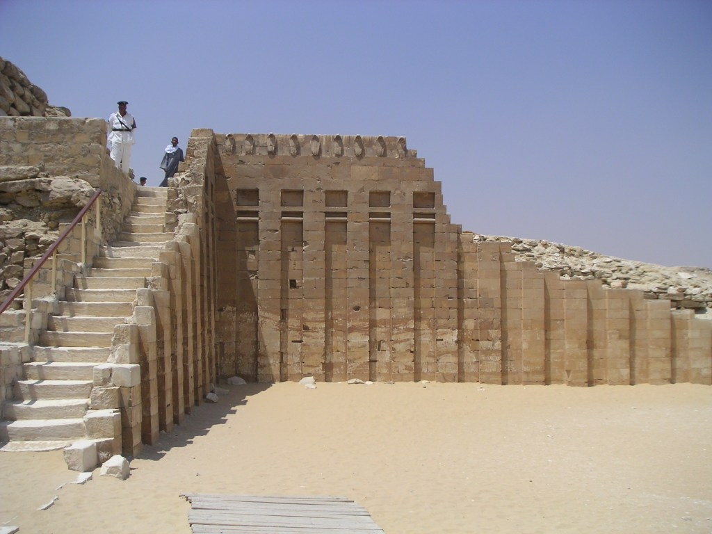 Mur aux cobras dans la cour méridionale du complexe de Djéser à Saqqarah - IIIe dynastie égyptienne